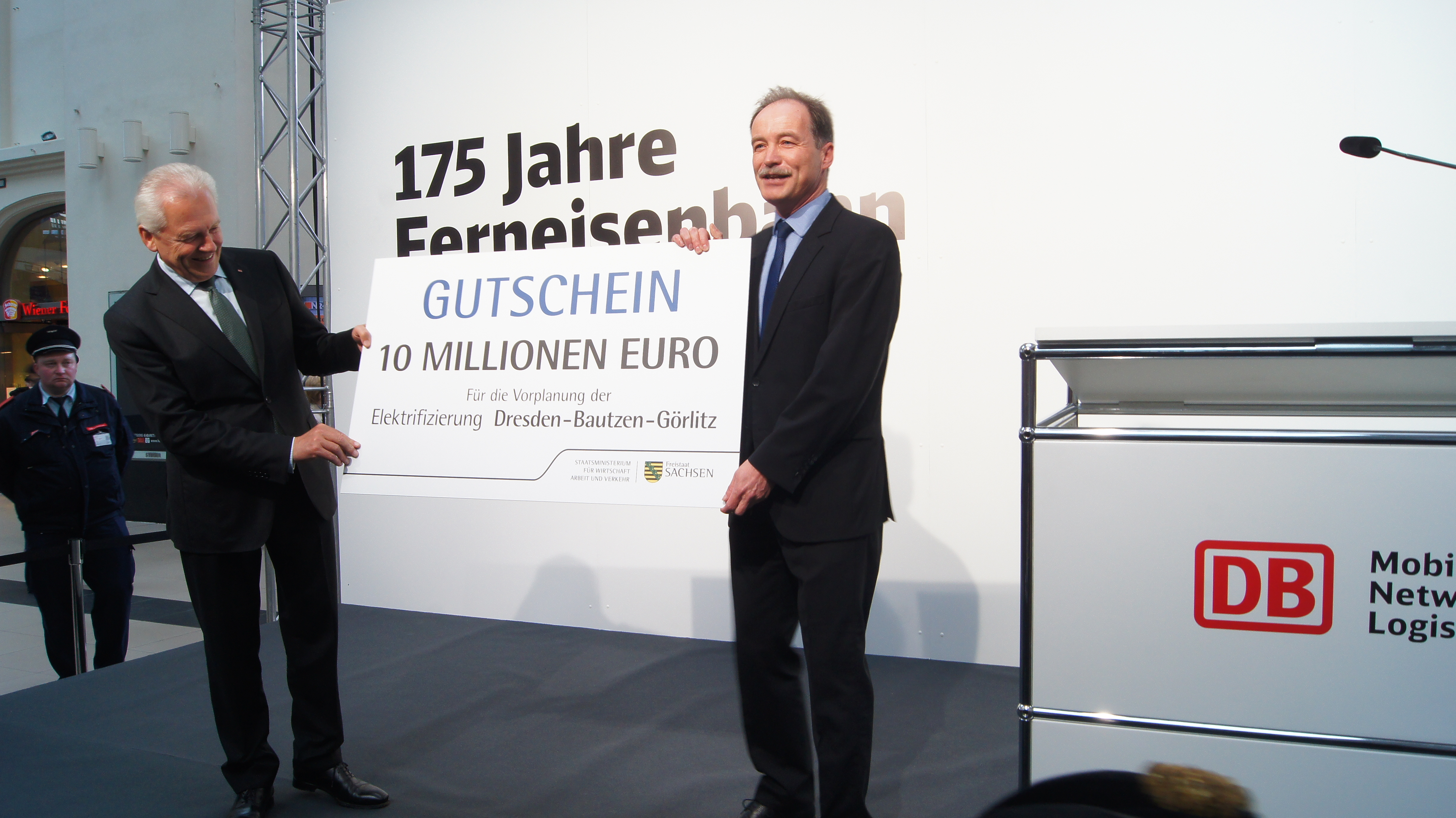 Übergabe eines symbolischen Gutscheins über 10 Millionen Euro für die Vorplanung der Elektrifizierung der Strecke Görlitz–Dresden durch den damaligen sächsischen Verkehrsminister Sven Morlok an den Vorstandsvorsitzenden der Deutschen Bahn AG Dr. Rüdiger Grube am 7. April 2014 in Dresden (im Rahmen der Festveranstaltung zum 175. Jubiläum der Strecke Leipzig–Dresden)